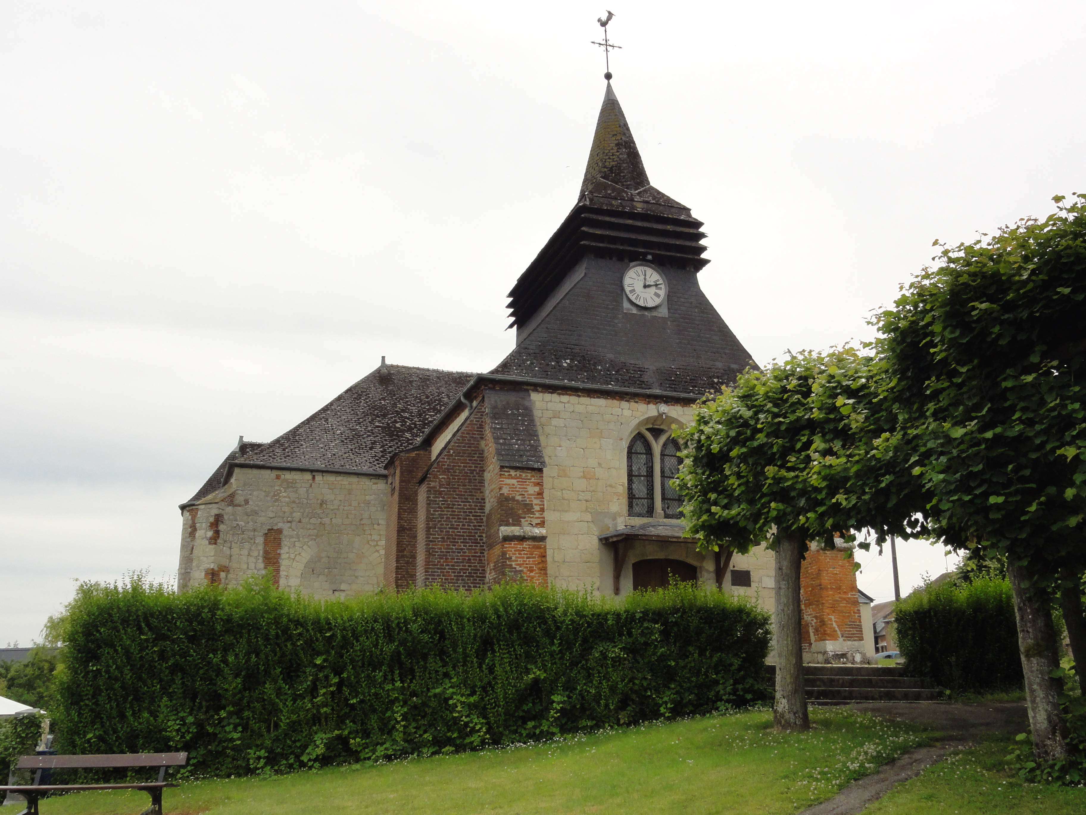 Montloué (Aisne) église